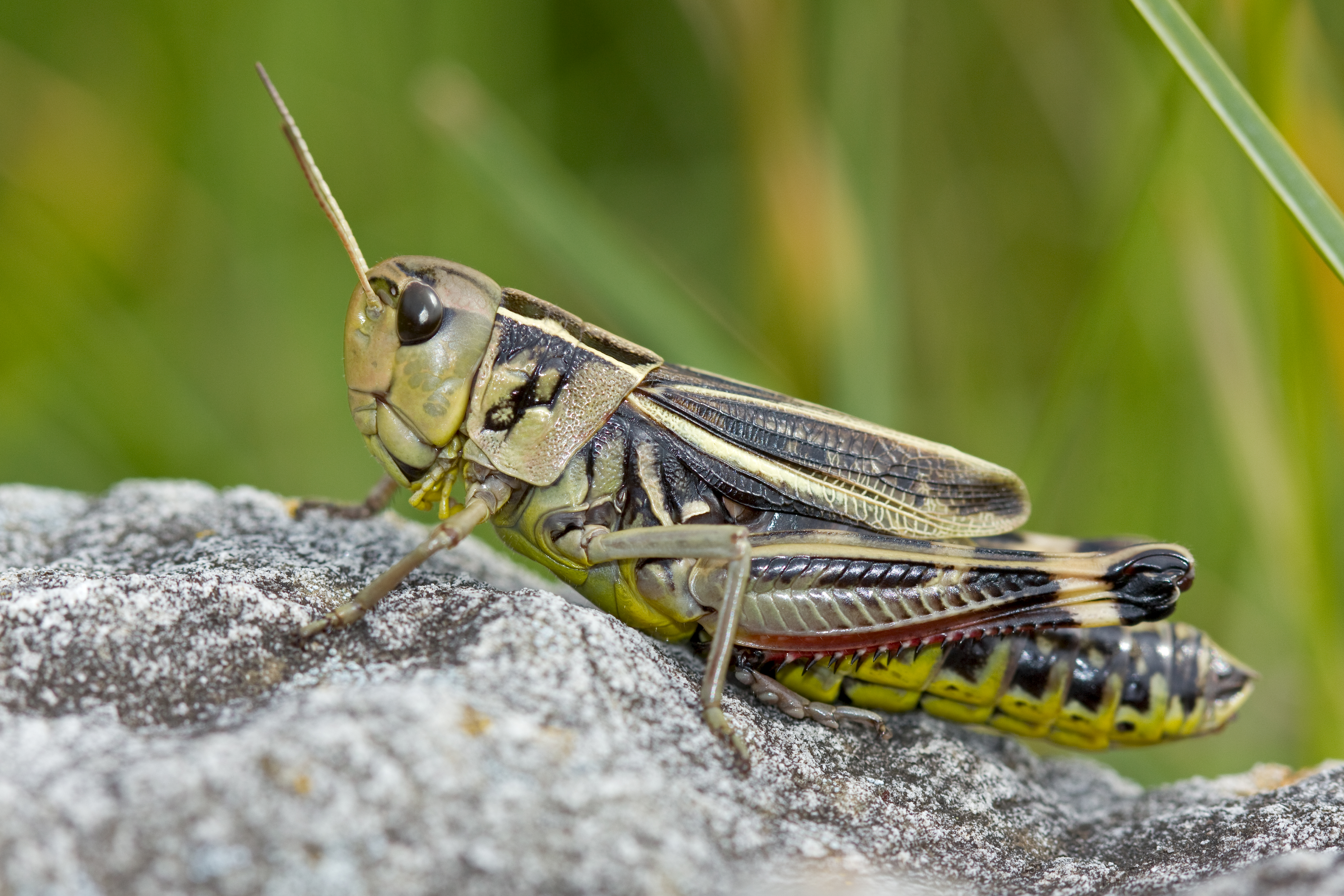 Poupée sibérienne femelle se reposant sur un roche dans une prairie alpine. Col de Lachau, Vercors, France.